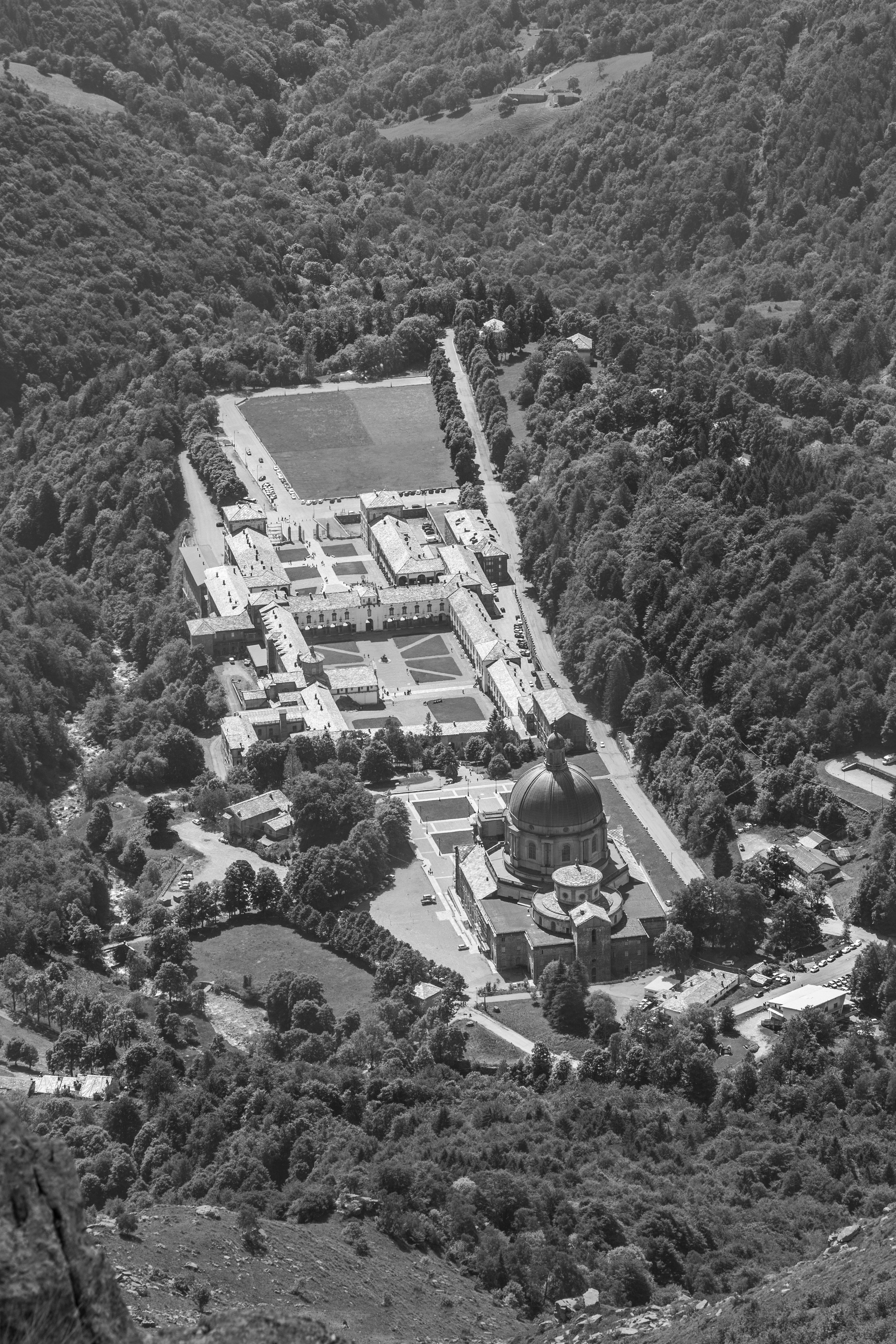 Riserva speciale del Sacro Monte di Oropa (Q47362077)